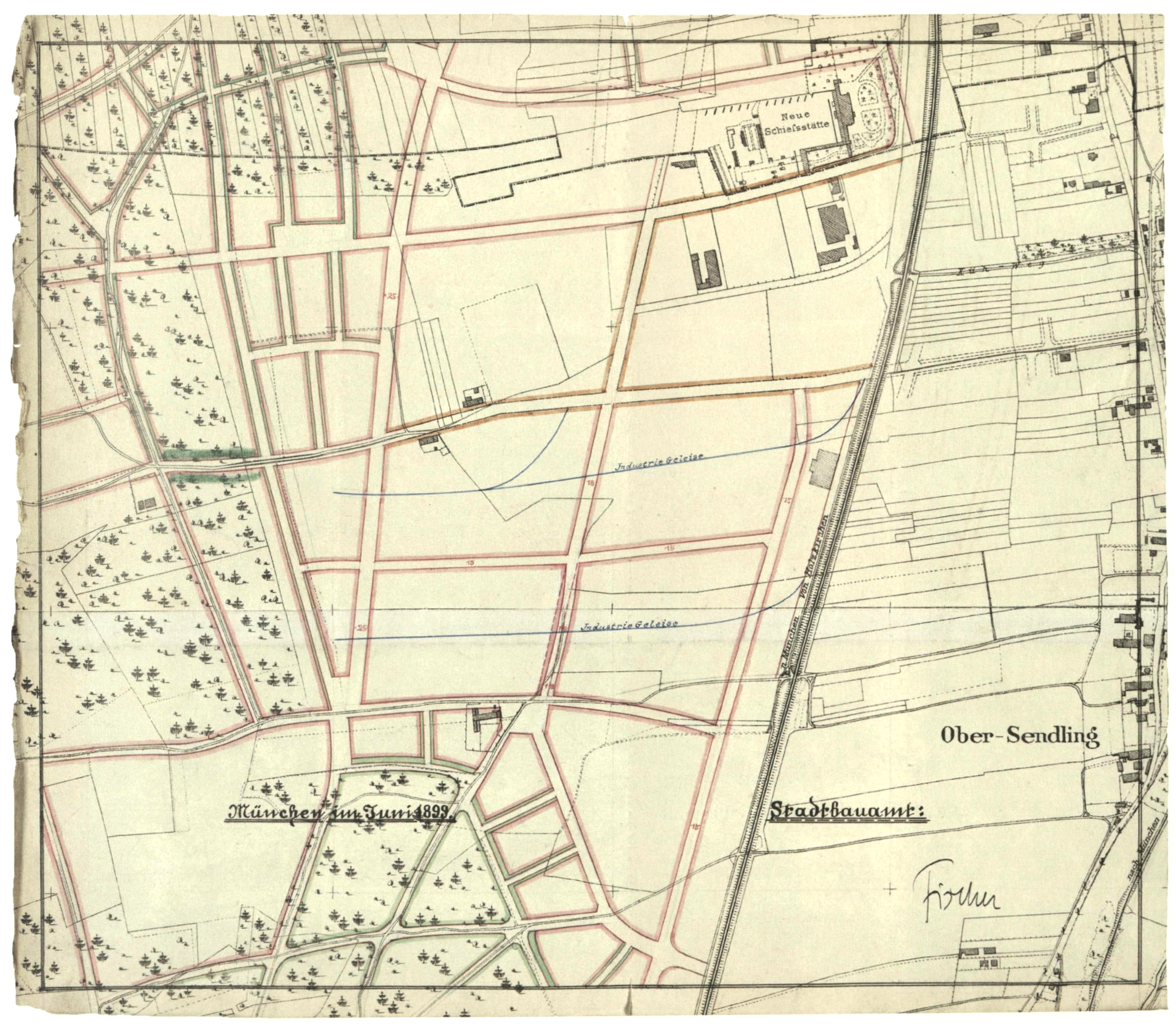 Baulinien im Areal der Isarwerke, Planung für die Boschetsrieder Straße in München